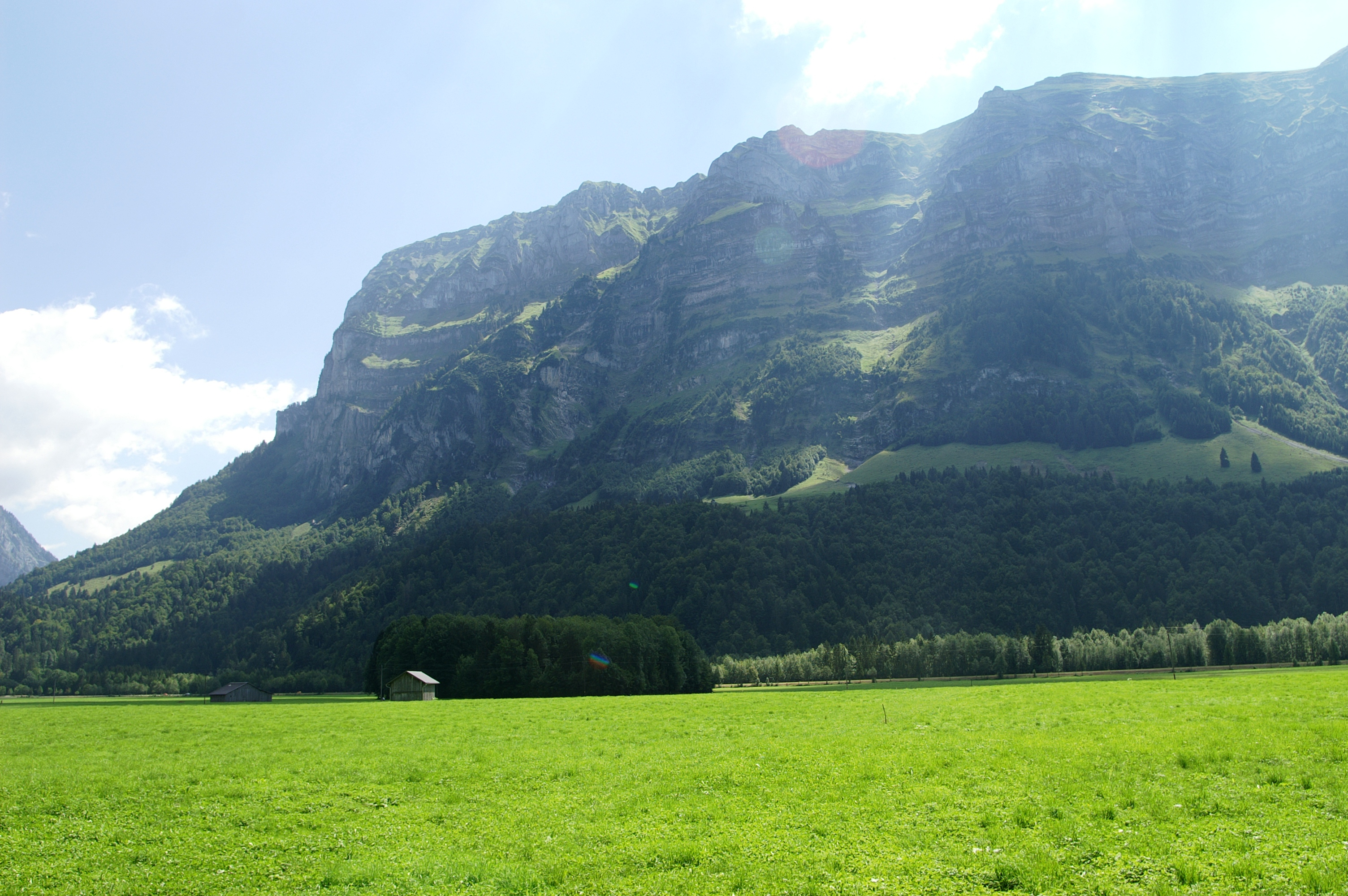 Nordflanke der Kanisfluh. Blick von Hirschau, Schnepfau.